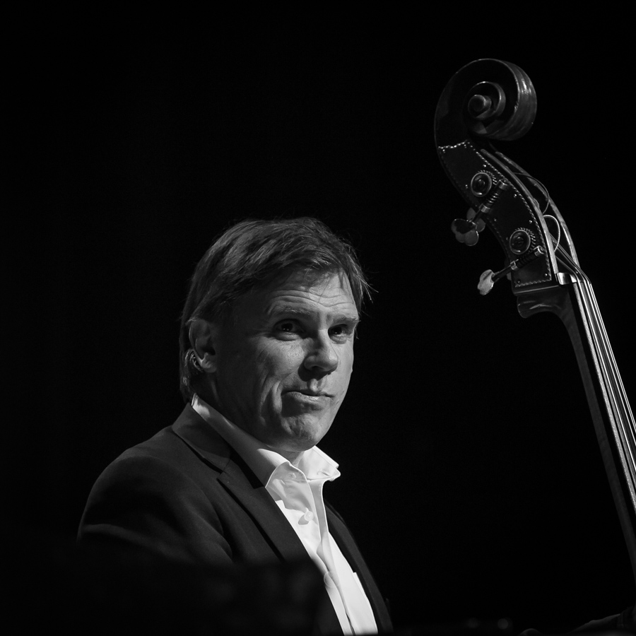 Stig Hvalryg opptrer på Chat Noir under Oslo Jazzfestival 2015